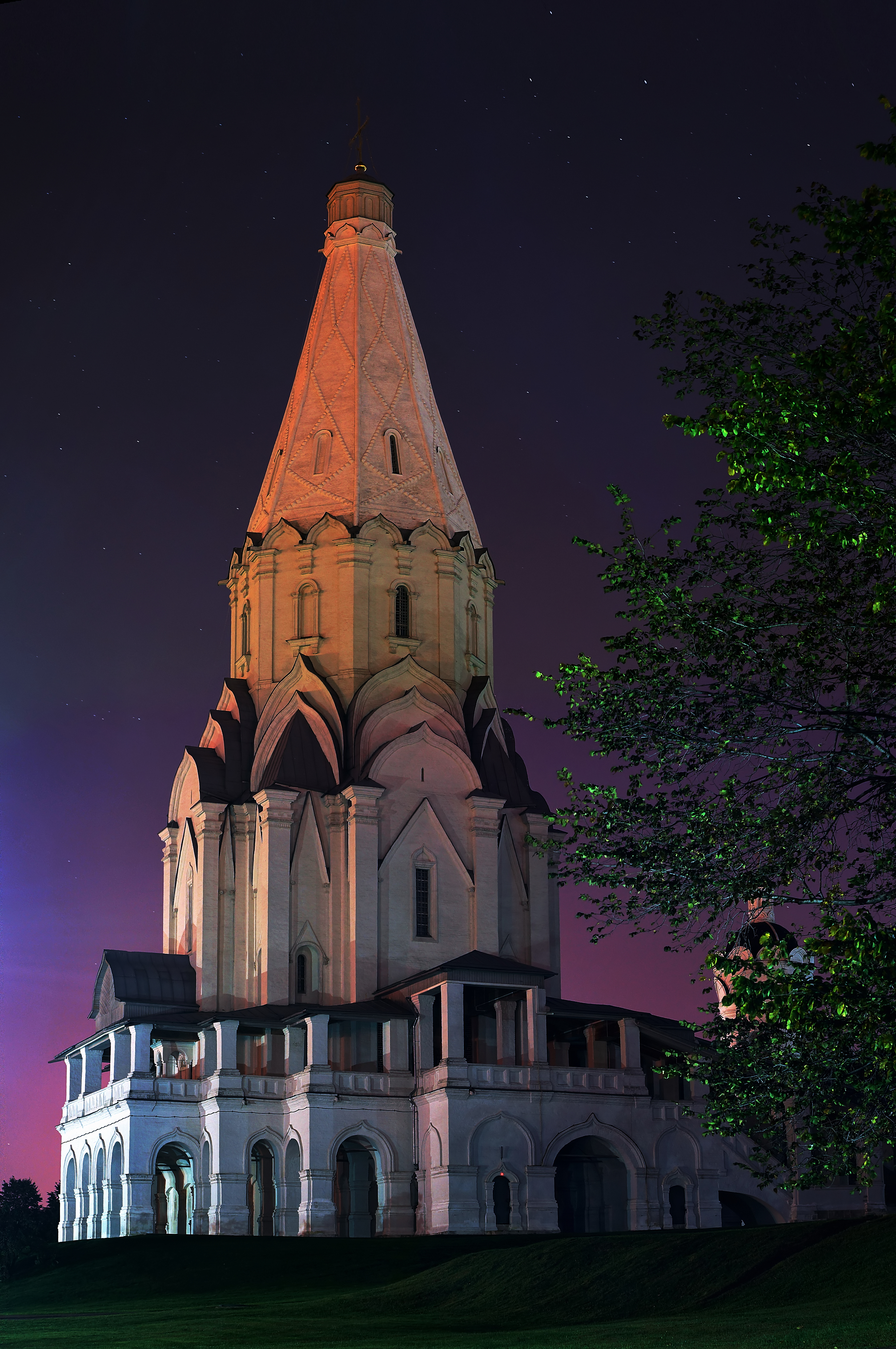 Храм стоит ночью без искусственной подсветки, внизу слабо освещен уличными фонарями, в верхней части огнями города. Эффект освещенности достигнут длительной выдержкой.